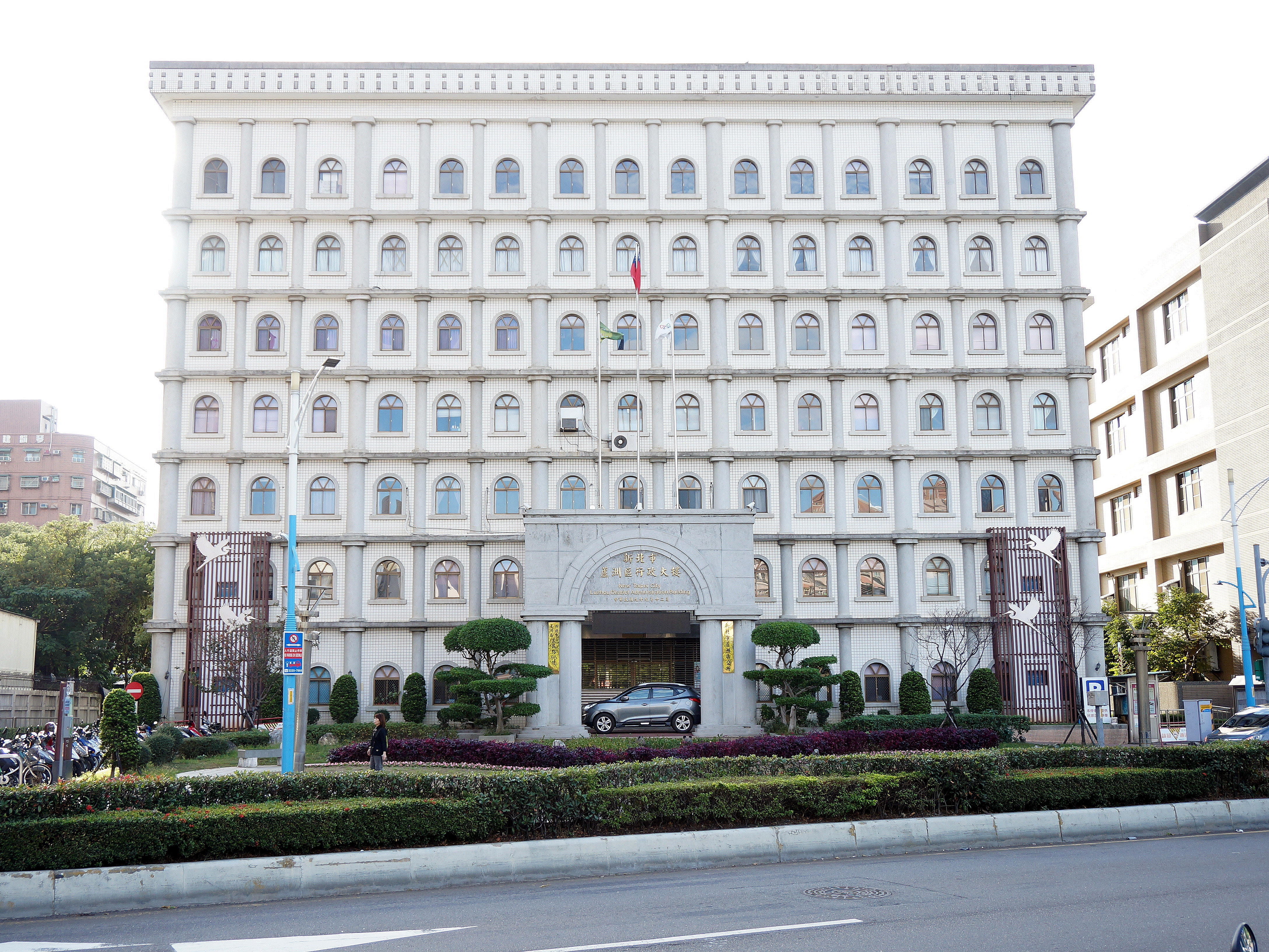 新北市蘆洲區行政大樓，地址：新北市蘆洲區三民路95號。